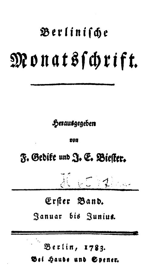 Berlinische Monatsschrift, Erstausgabe erschienen 1783. Scan von der Universitätsbibliothek Bielefeld.